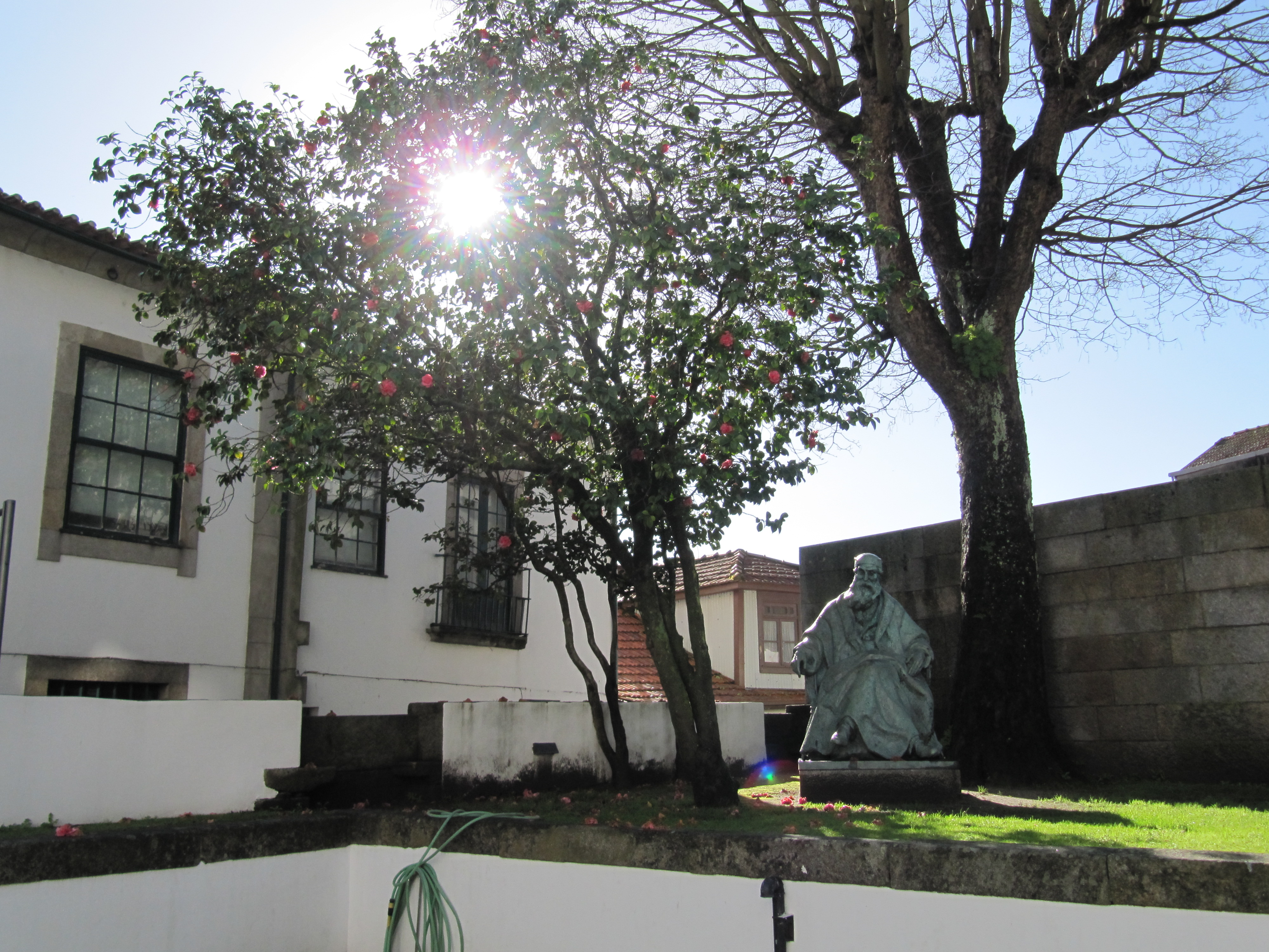 Da kummt die Sunn